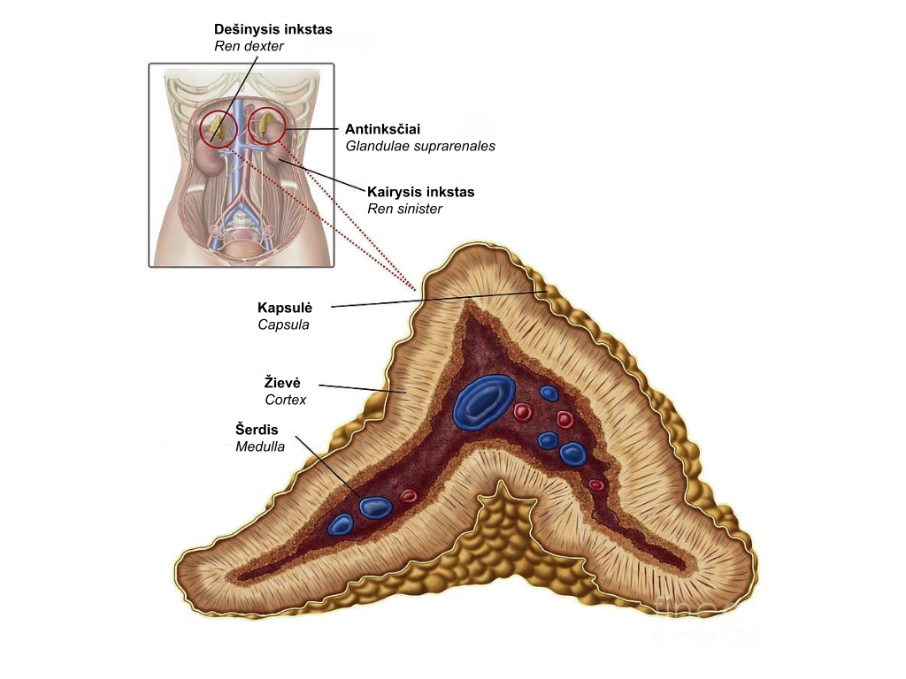 Antinksčių padėtis organizme ir antinksčio skersinis pjūvis